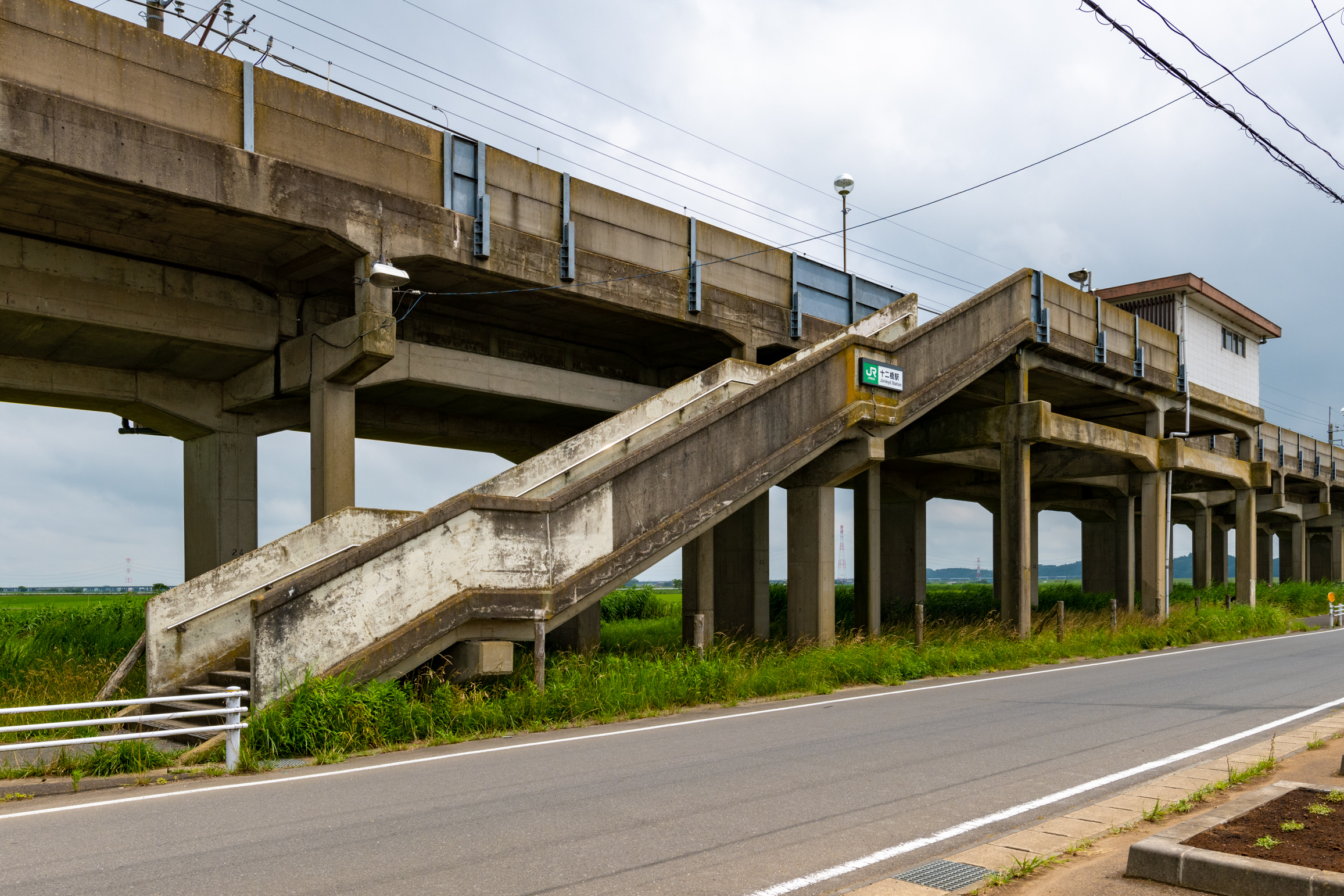 東日本旅客鉄道株式会社鹿島線十二橋駅全景